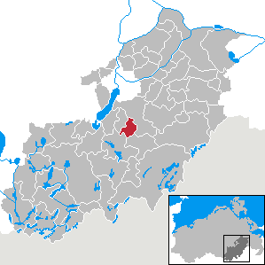 Cammin in Mecklenburg-Vorpommern, Landkreis Mecklenburg-Strelitz